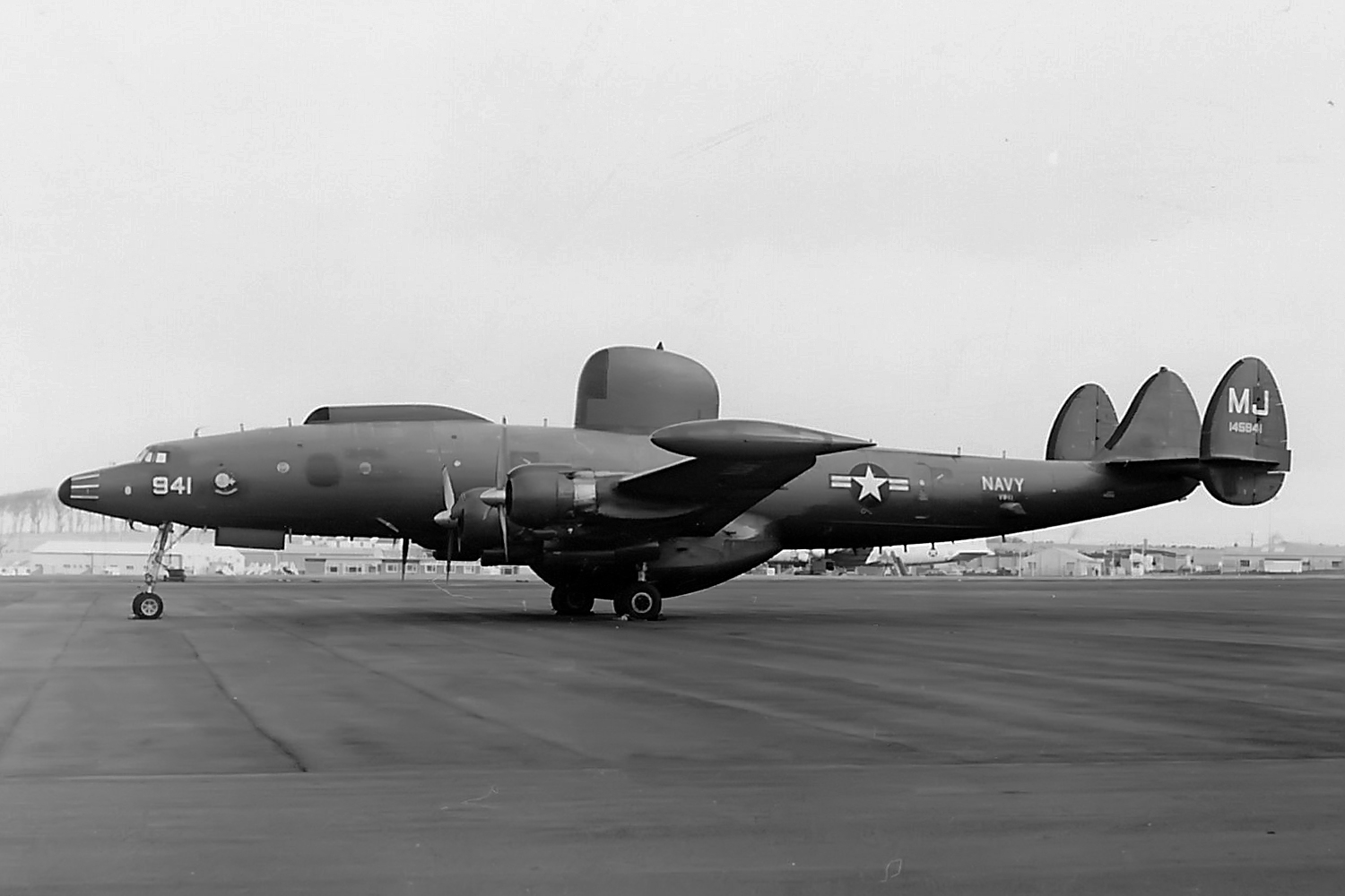 Prestwick, Scotland 1960's. Die EC-121P 'Warning Star' ist eine weiterentwickelte Variante der WV-2 der US Navy